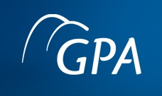 Marca GPA